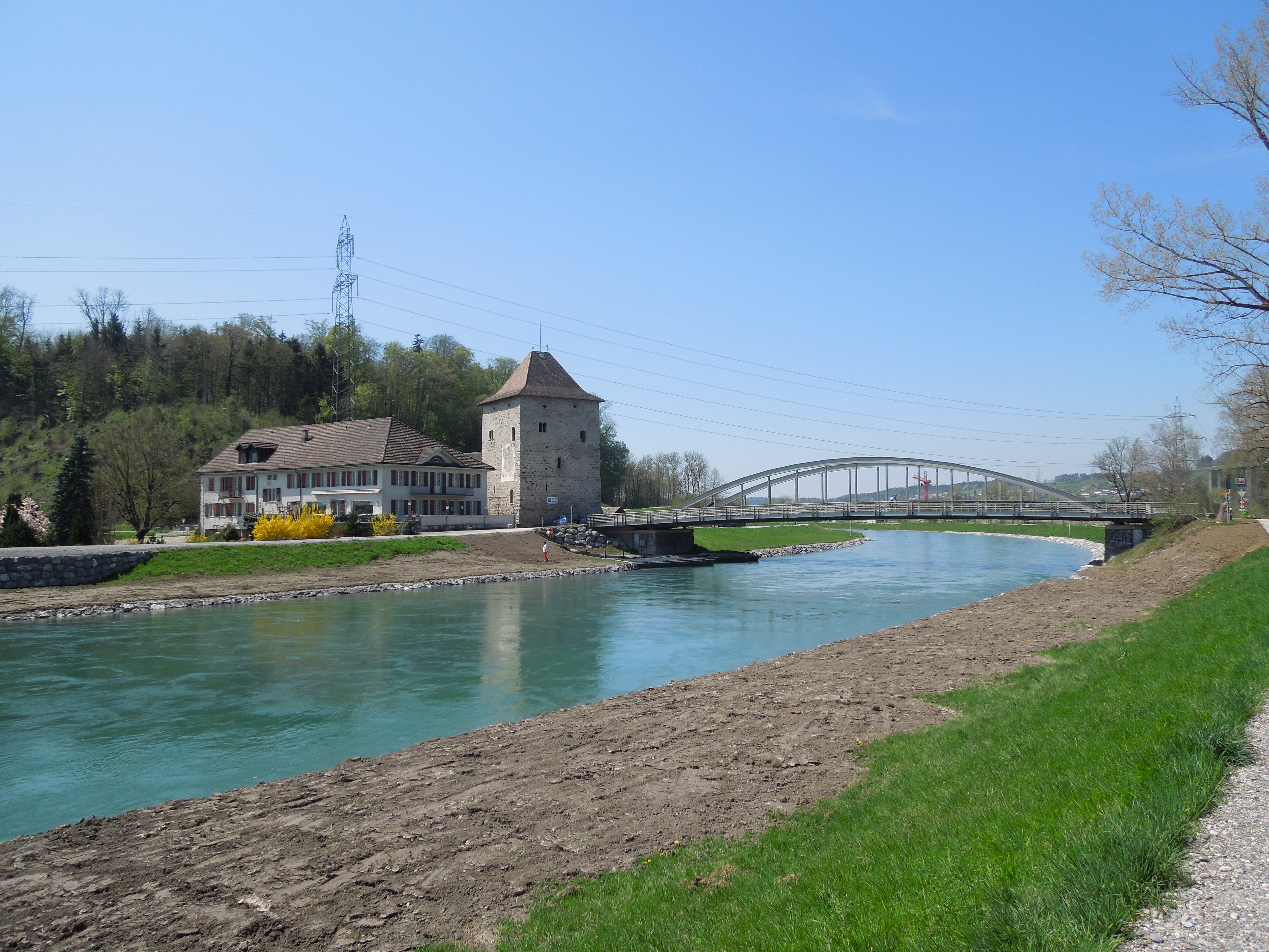 Schloss Grynau und der sanierte Linthkanal im Frühjahr 2013